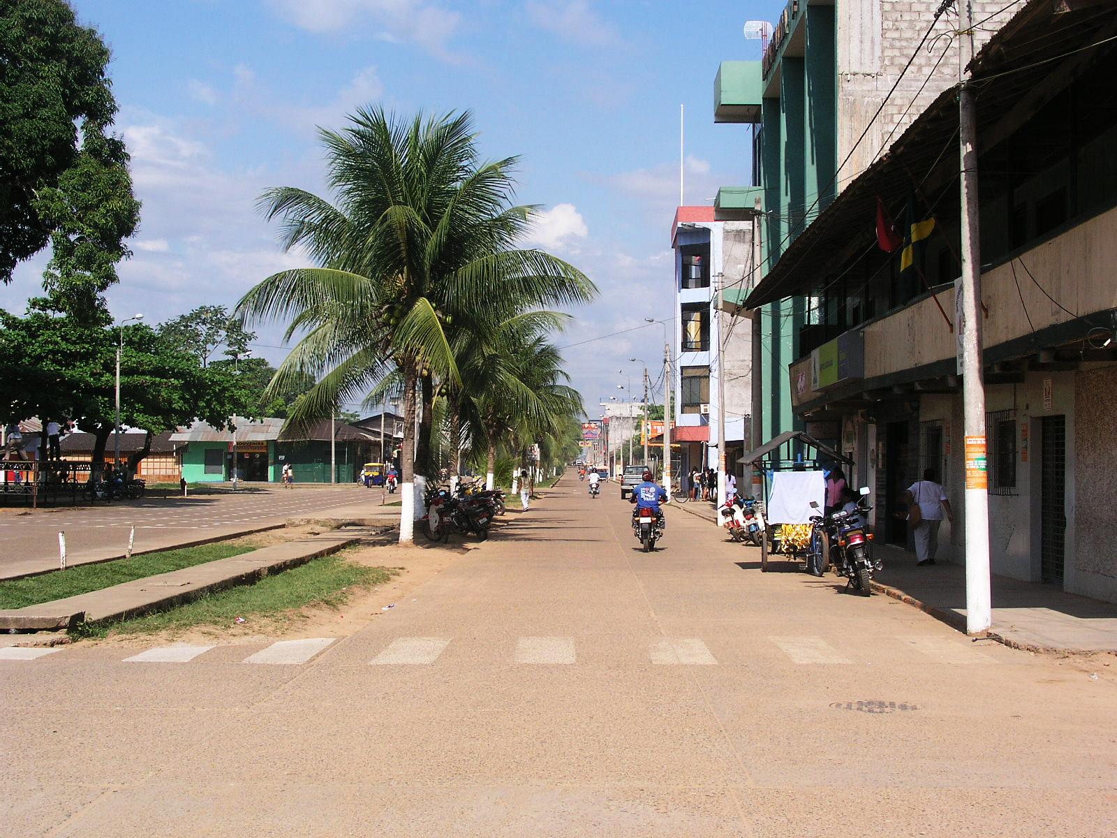 Street view, Puerto Maldonado, Peru